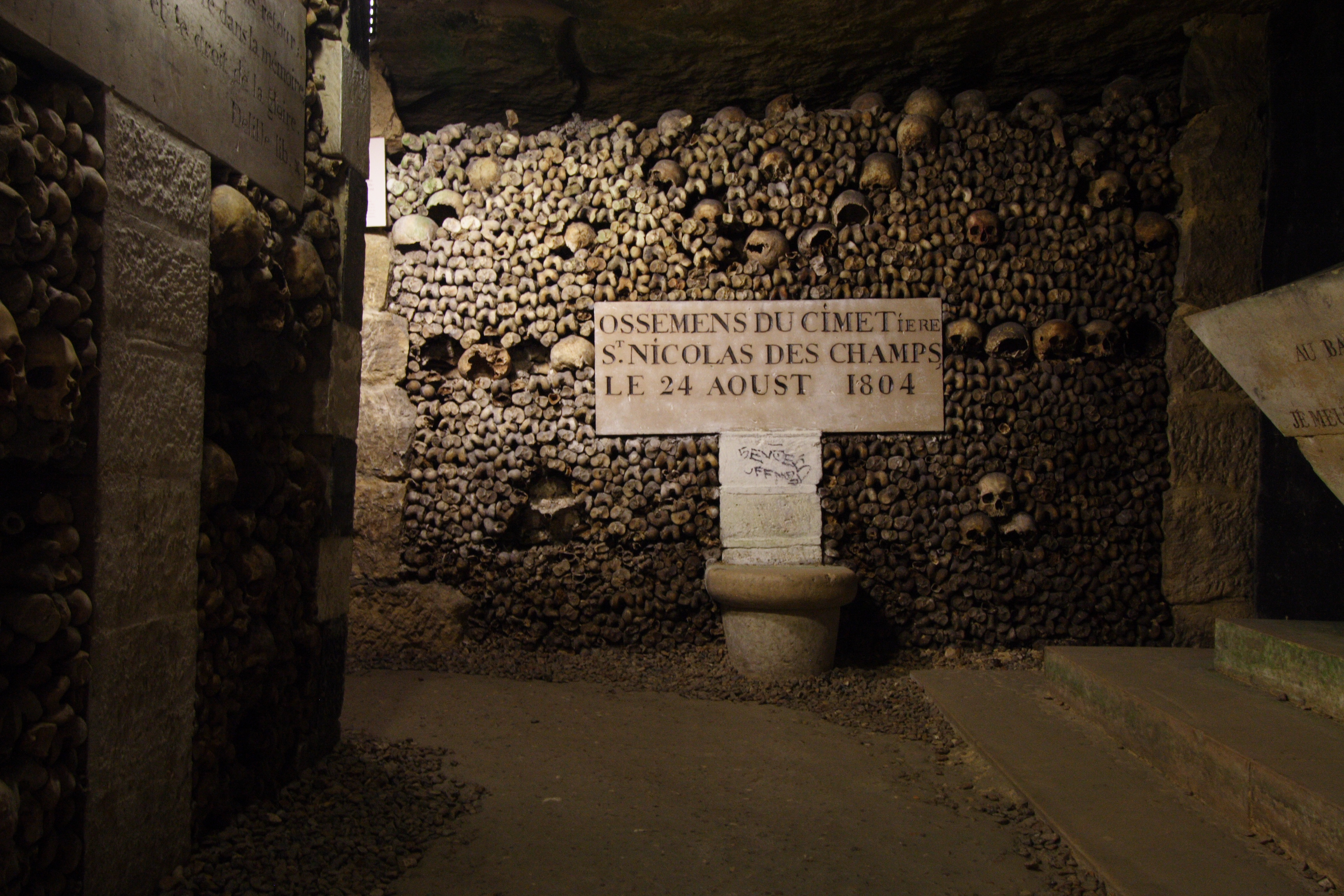 Catacombes de Paris(Paris, France)